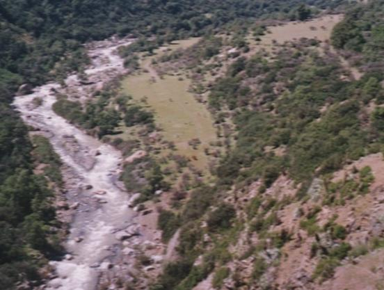 Vista al Río Molina, Región Metropolitana, Chile